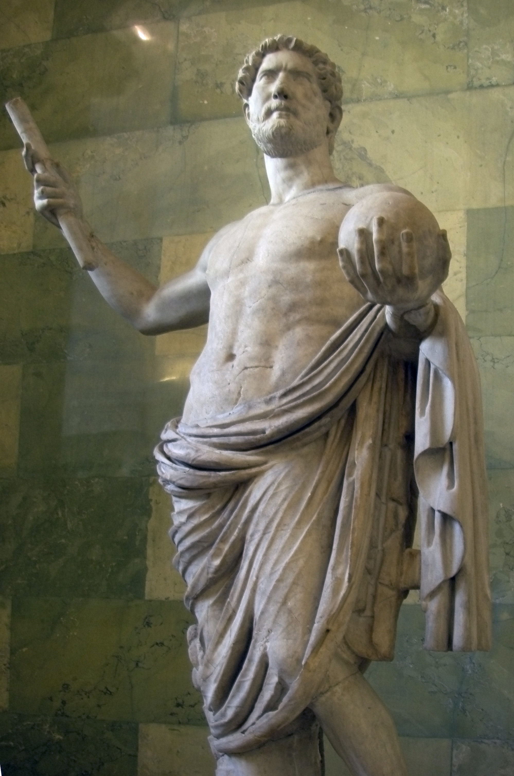 Адриан (император - 117-138 гг.). Первая половина II в. Мрамор, А 162 Эрмитаж, зал Юпитера, Санкт-Петербург, Россия.